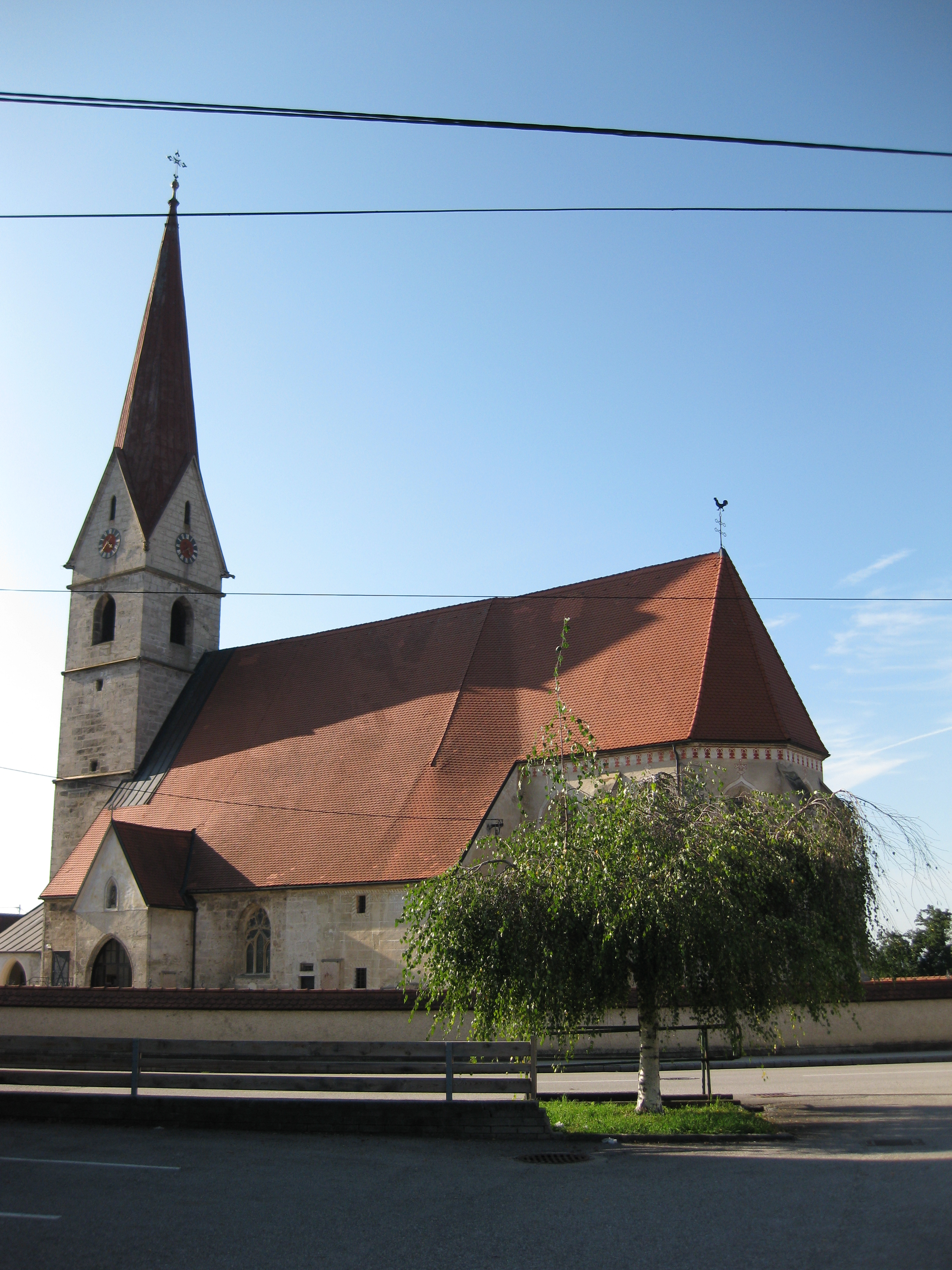 Kath. Pfarrkirche Mariä Himmelfahrt samt Friedhof